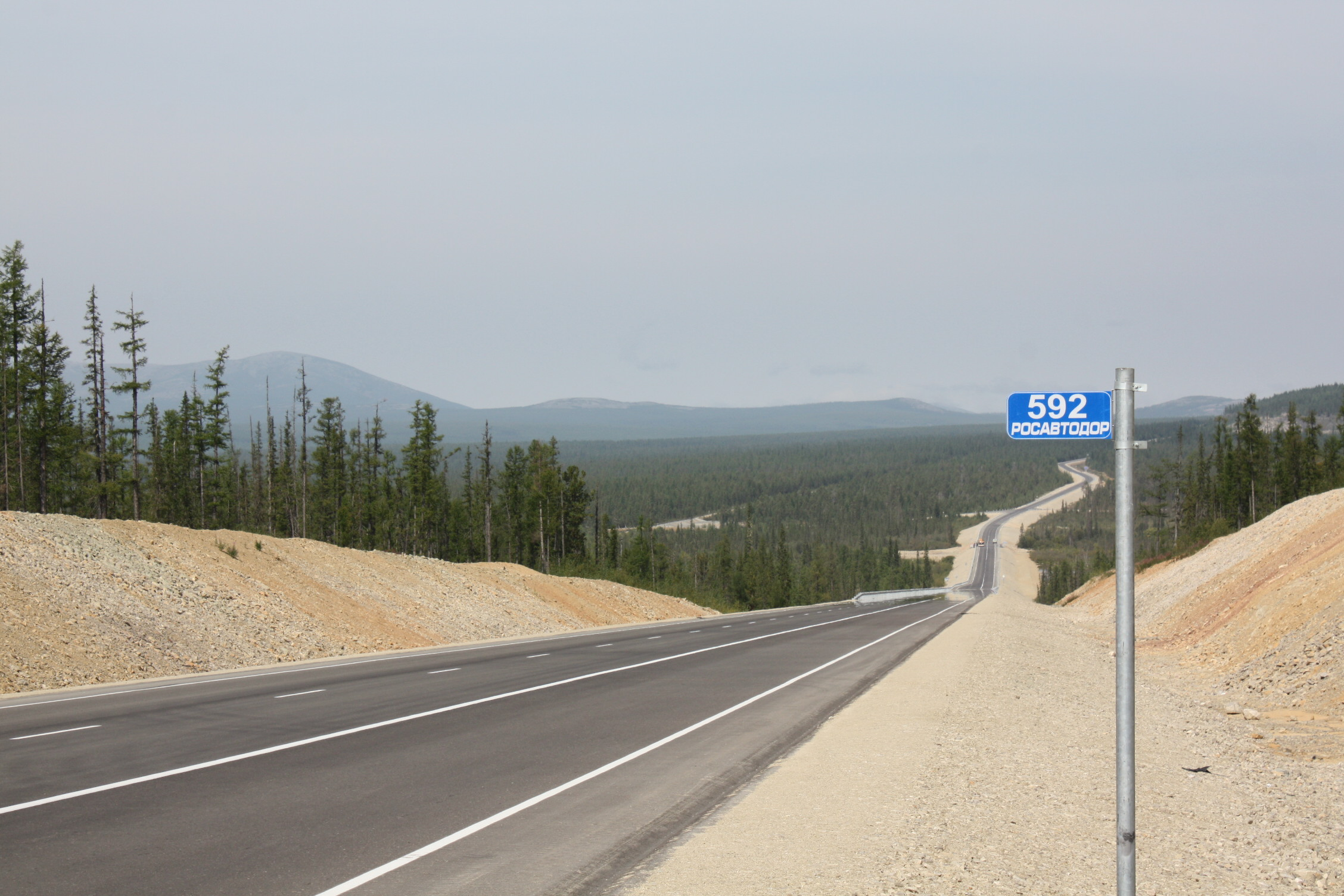 Участок после реконструкции, сдан в 2014 году